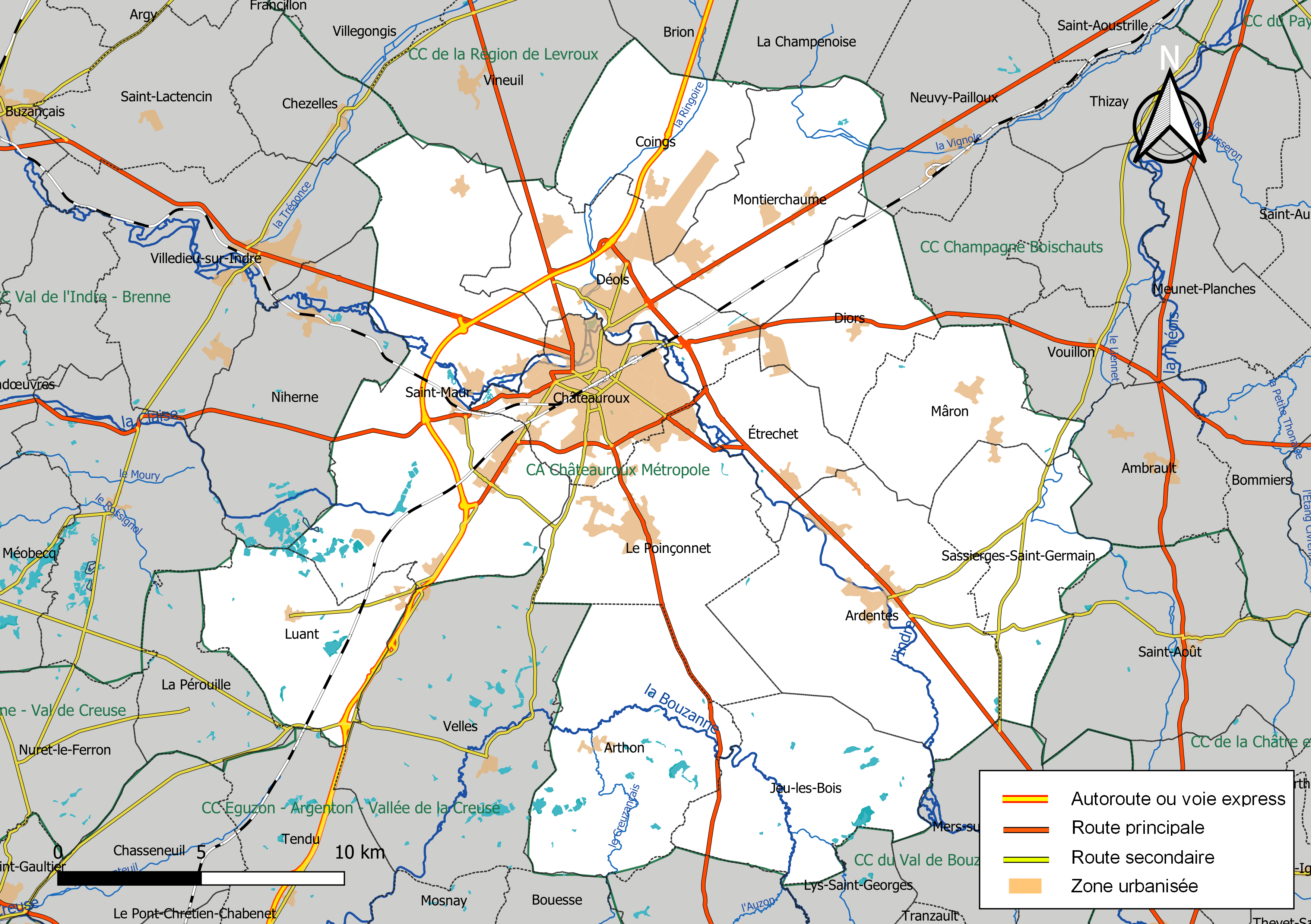 Carte de l'intercommunalité Châteauroux Métropole, département de l'Indre, France. Composition au 1er janvier 2019.